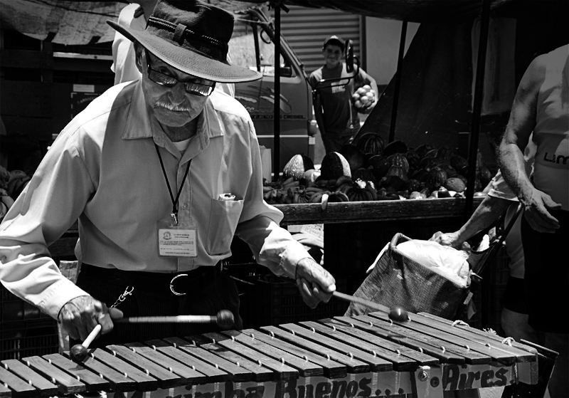 Un marimbero costarricense.